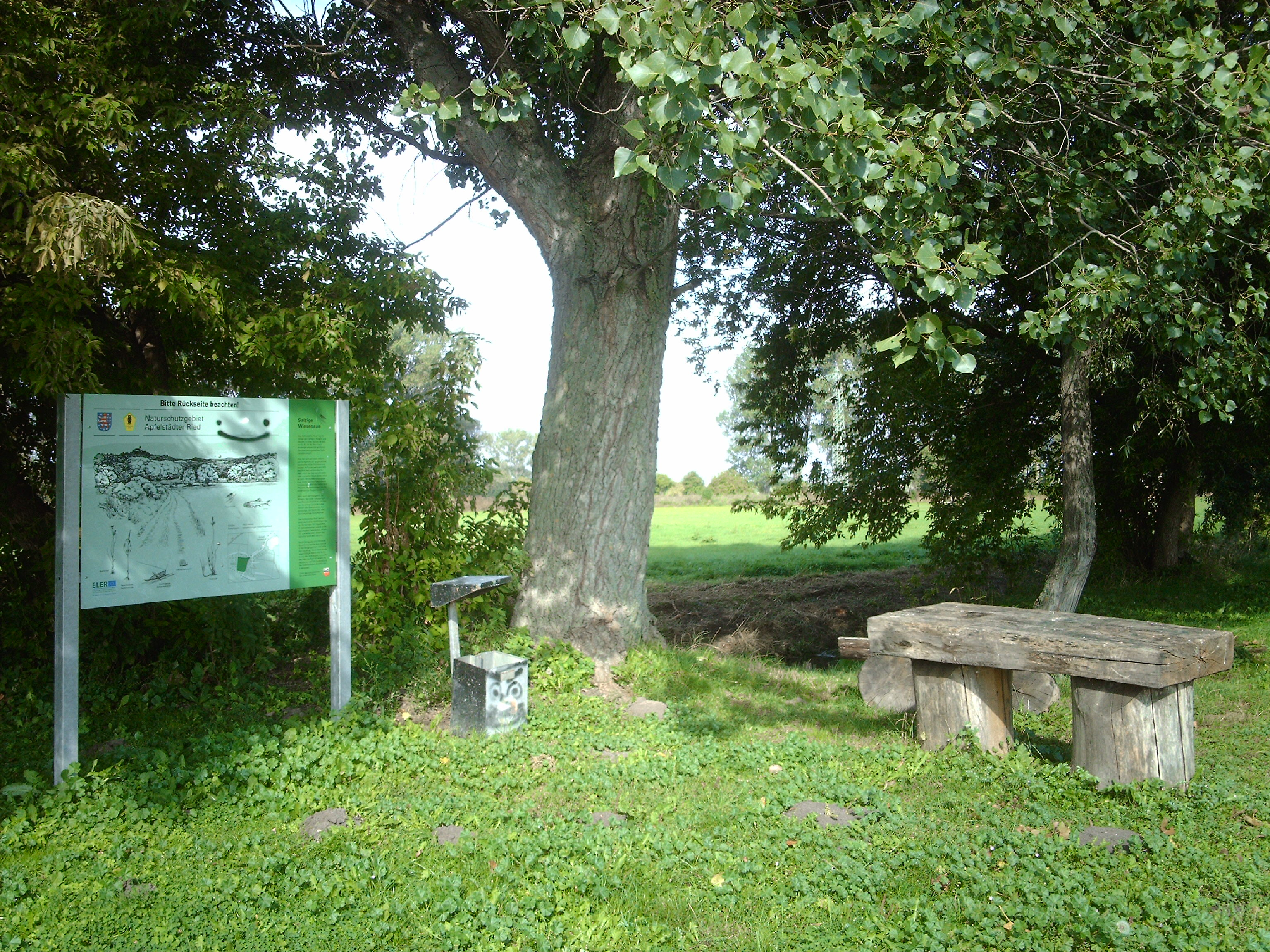 An der Salzquelle bei Sülzenbrücken (Amt Wachsenburg).